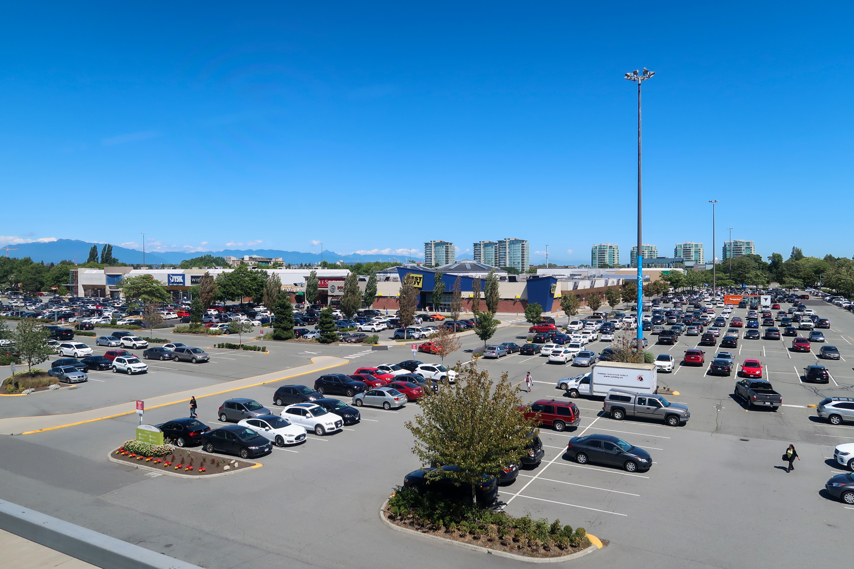 Lansdowne Centre